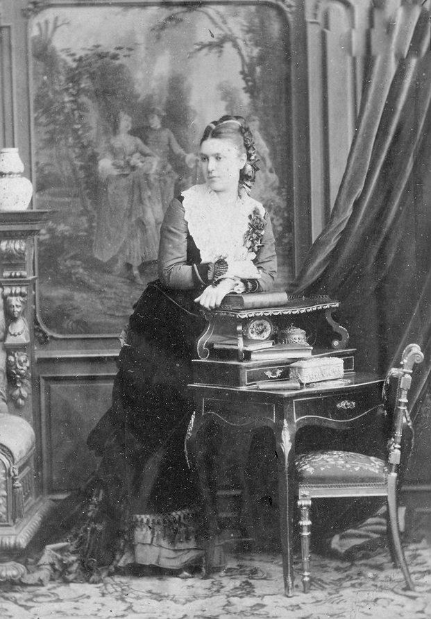 Графиня Мария Александровна Адлерберг (1849—1926)